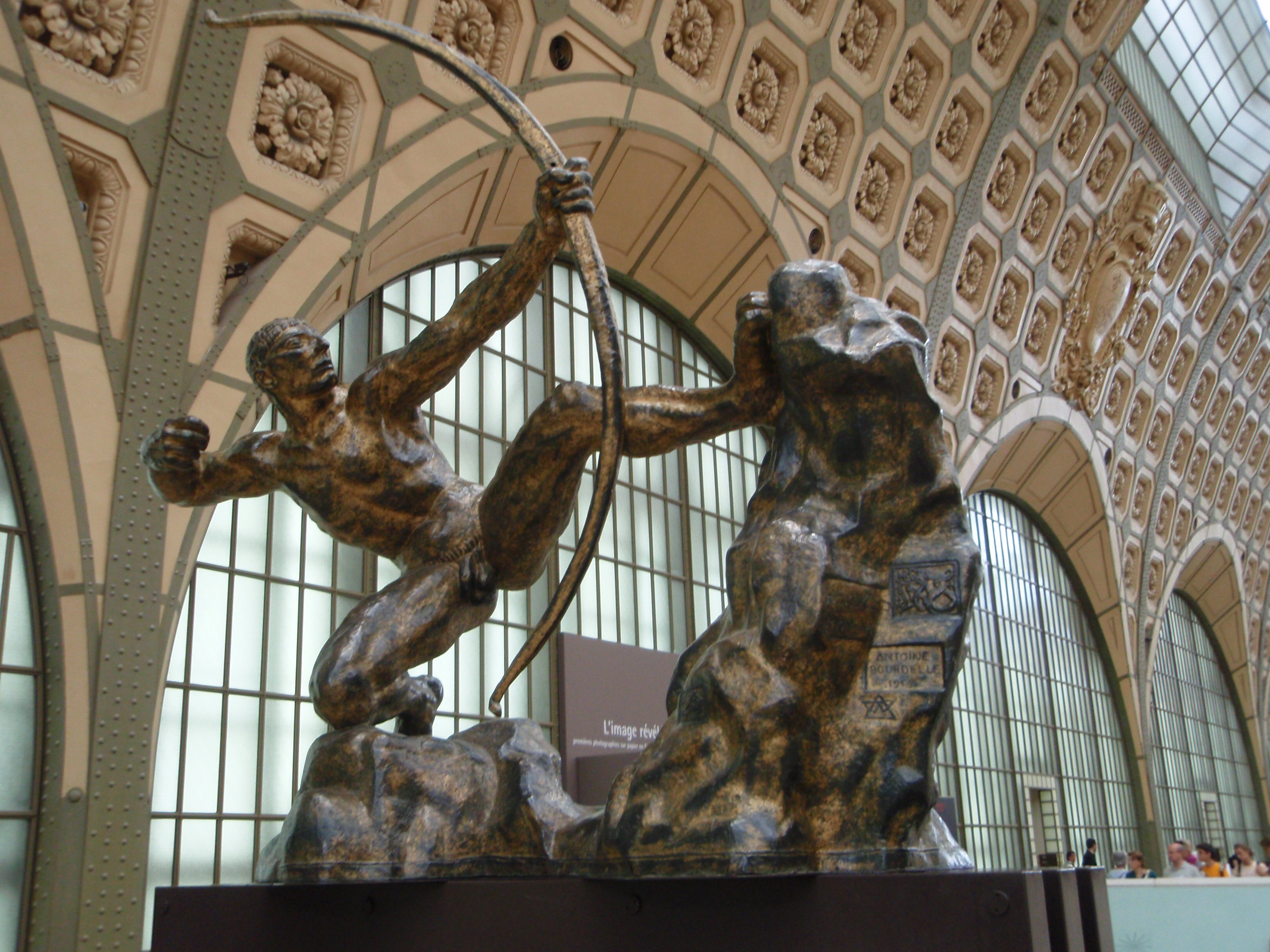 Héraklès Archer de Bourdelle musée Orsay Paris France